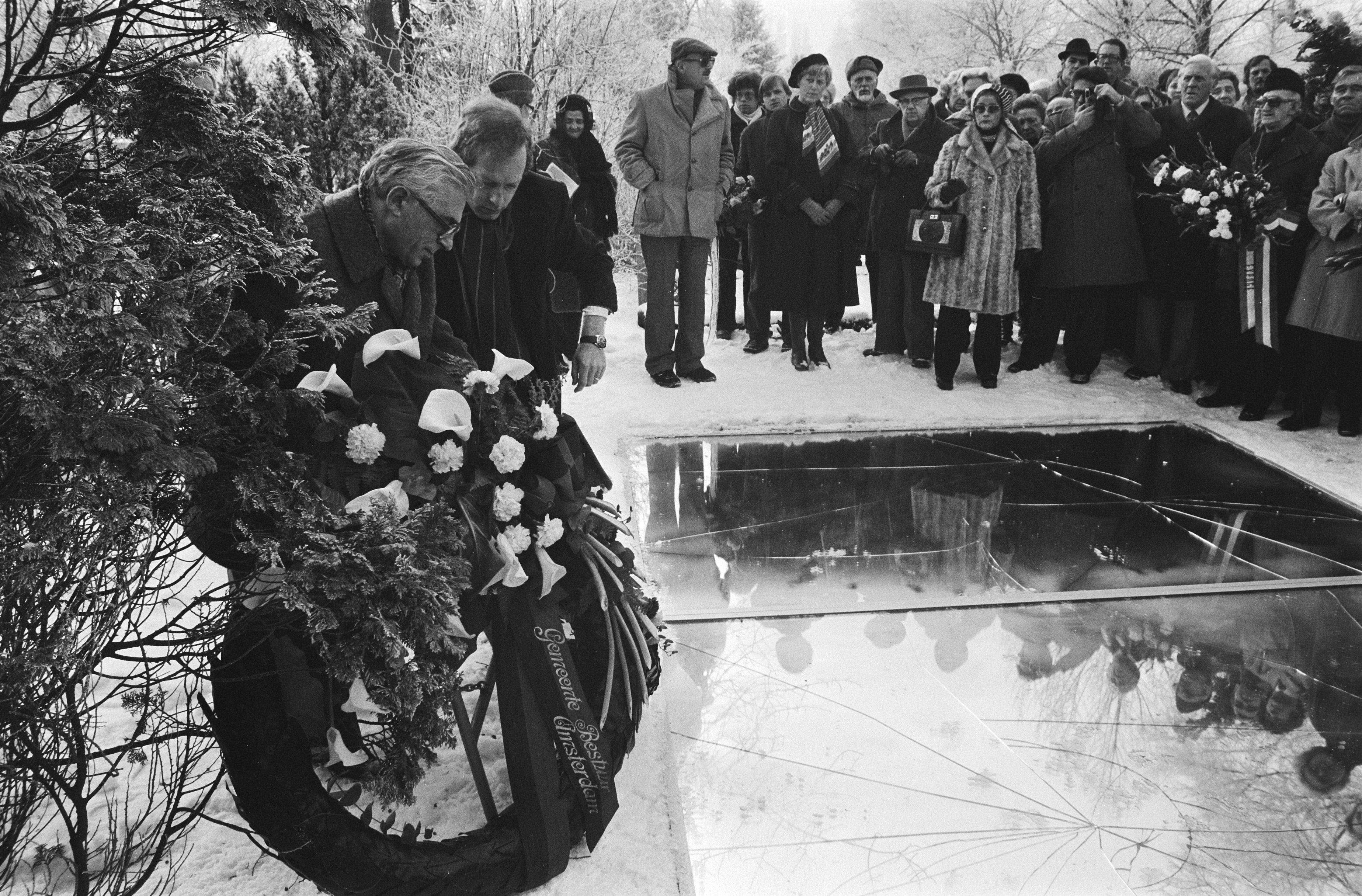 Collectie / Archief : Fotocollectie Anefo Reportage / Serie : [ onbekend ] Beschrijving : Jaarlijkse herdenking Nederlands Auschwitz Comite op de Nieuwe Oosterbegraafplaats in Amsterdam; burgemeester Polak (l) legt krans Datum : 28 januari 1979 Locatie : Amsterdam, Noord-Holland Trefwoorden : burgemeesters, herdenkingen Instellingsnaam : Nieuwe Oosterbegraafplaats Fotograaf : Bogaerts, Rob / Anefo Auteursrechthebbende : Nationaal Archief Materiaalsoort : Negatief (zwart/wit) Nummer archiefinventaris : bekijk toegang 2.24.01.05 Bestanddeelnummer : 930-0925